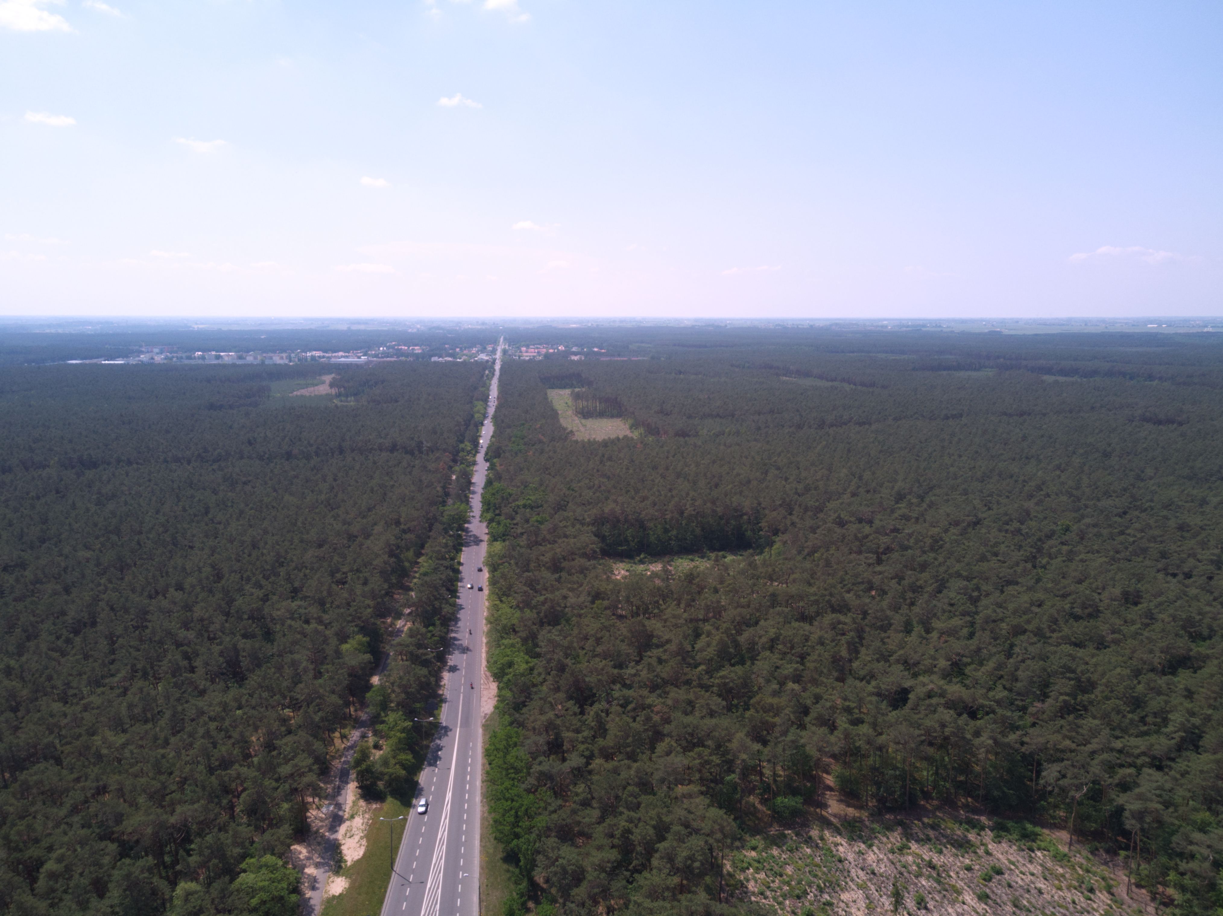 Dzielnica Michelin z lotu ptaka (2020 r.)